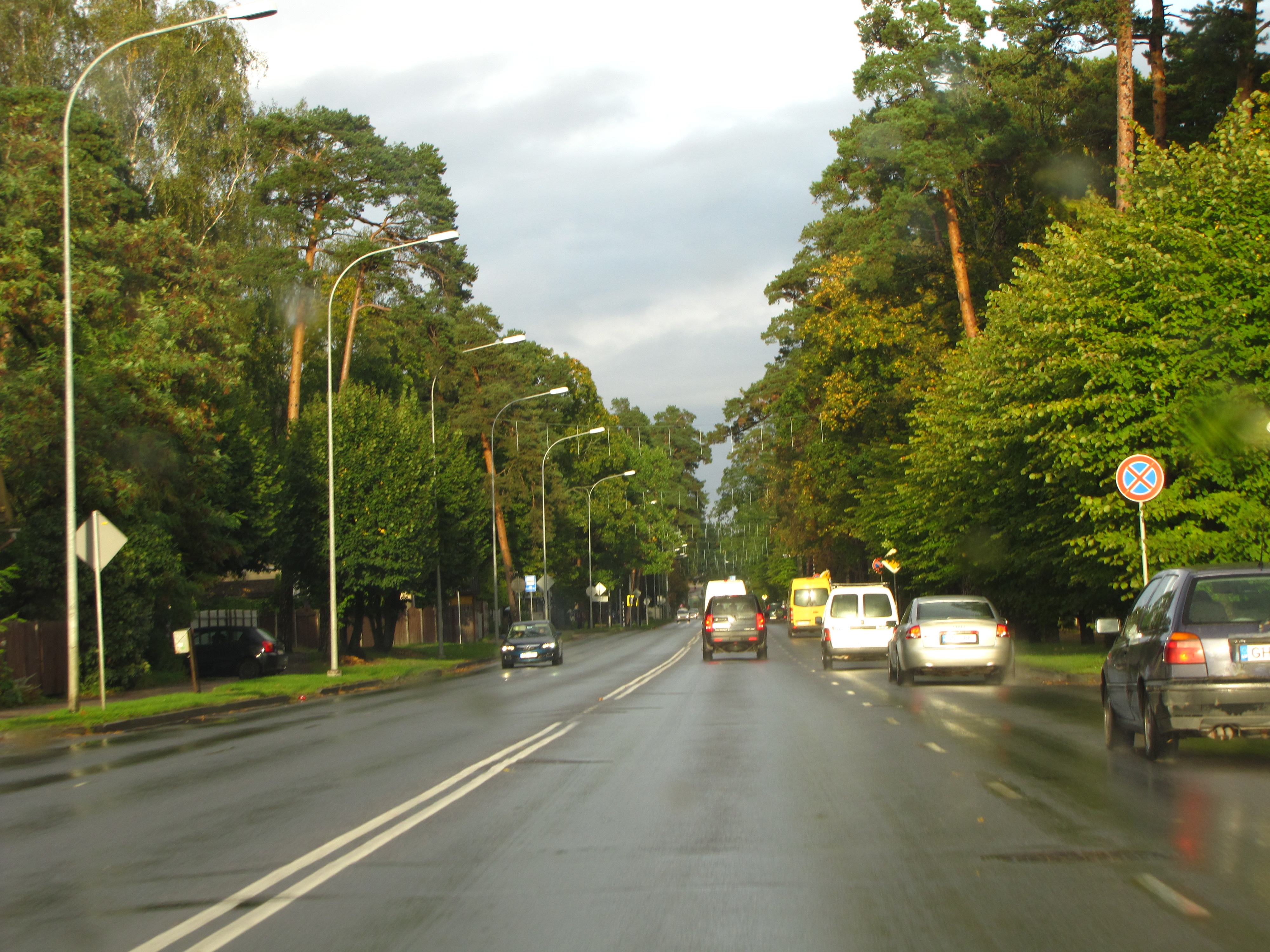 Lienes street